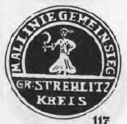 Altes Siegel bzw. Stempel des Ortes Mallnie im Kreis Groß Strehlitz, Schlesien.